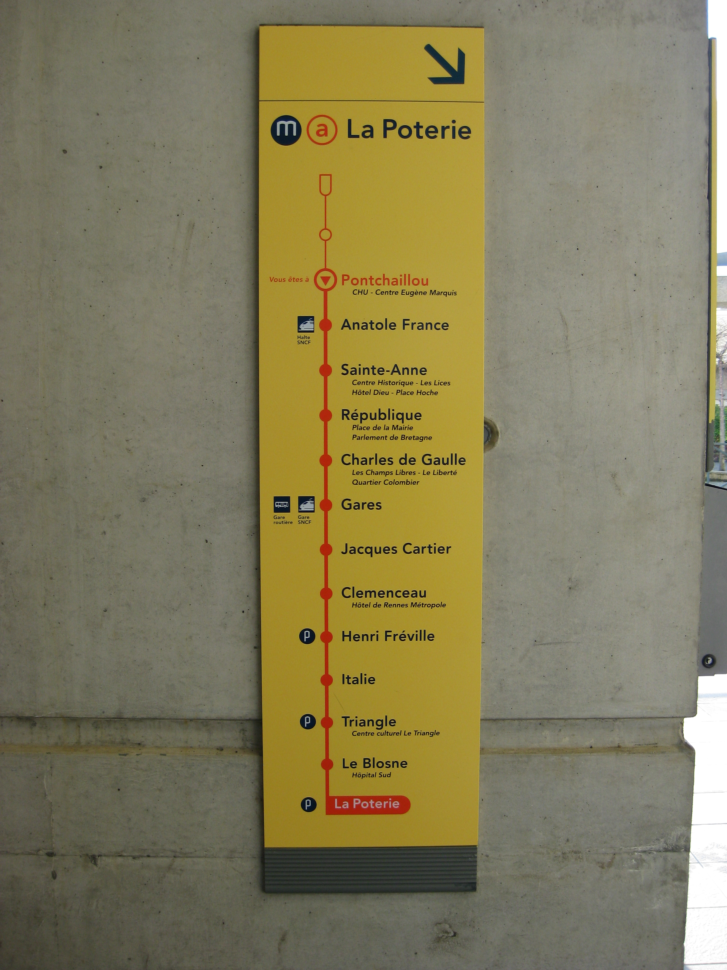 Métro Rennes Signalisation Jaune Ligne